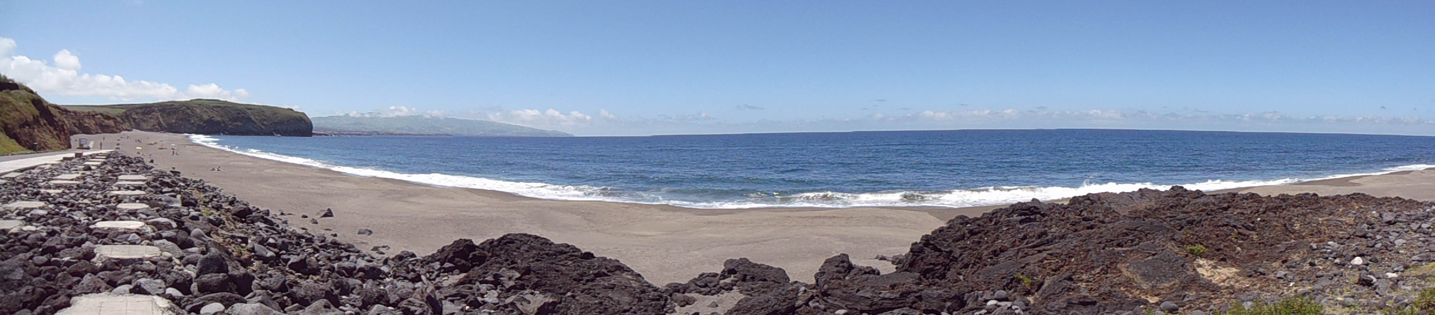 Areal de Santa Bárbara, freguesia da Ribeira Seca, concelho da Ribeira Grande, ilha de São Miguel, Região Autónoma dos Açores, Portugal: vista panorâmica de leste para oeste.